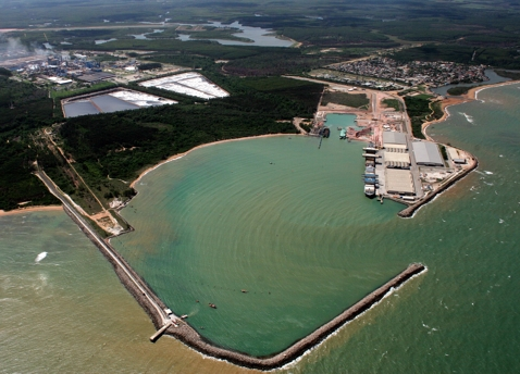 Área do portocel. Vista por helicóptero.